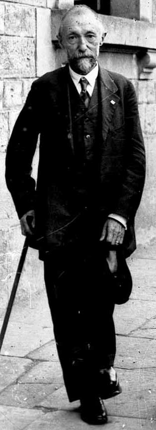 Telesforo Aranzadi zientzialari bergararra 1930ean.